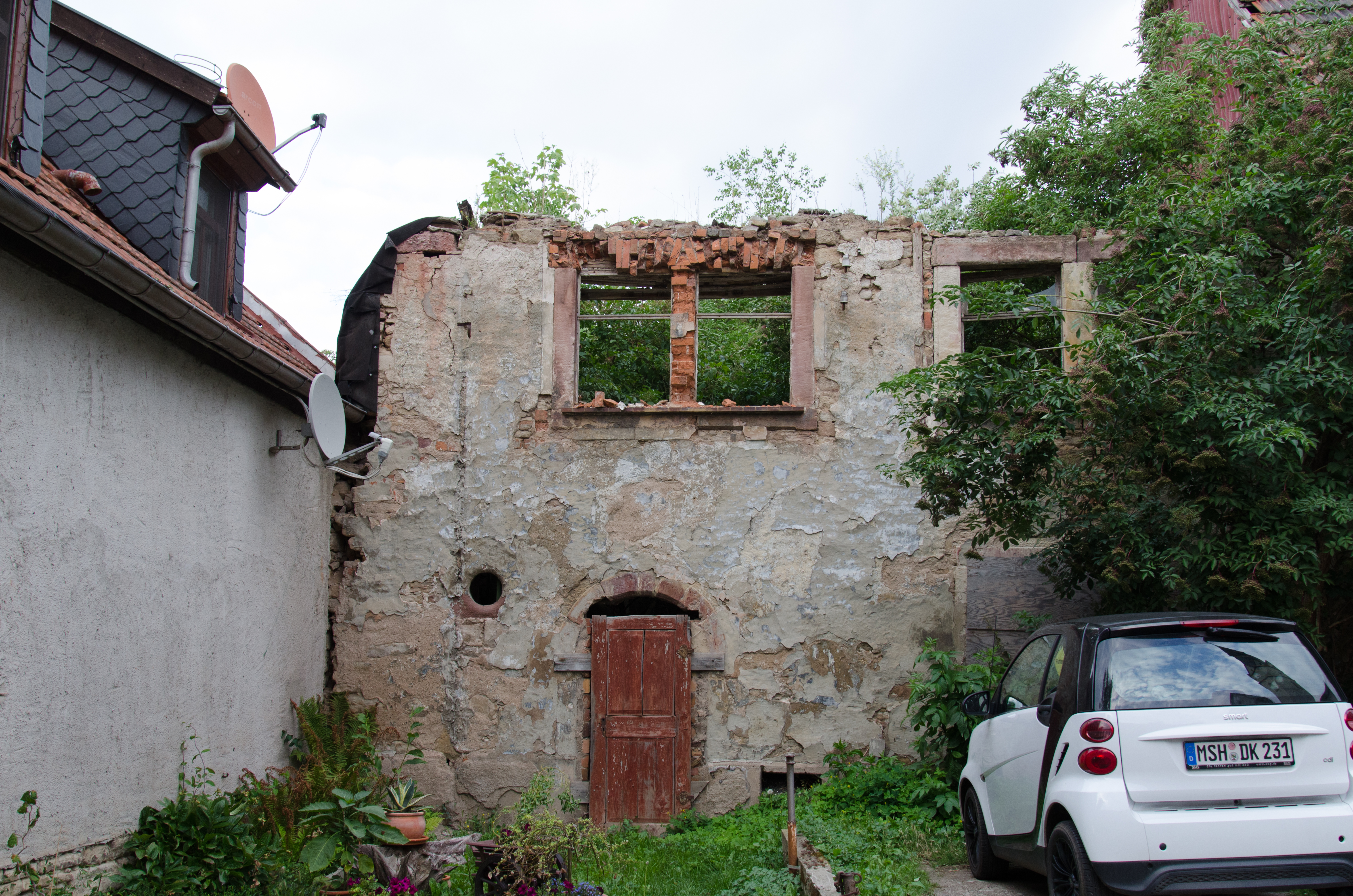 Sangerhausen, Hinter der Ulrichkirche 8